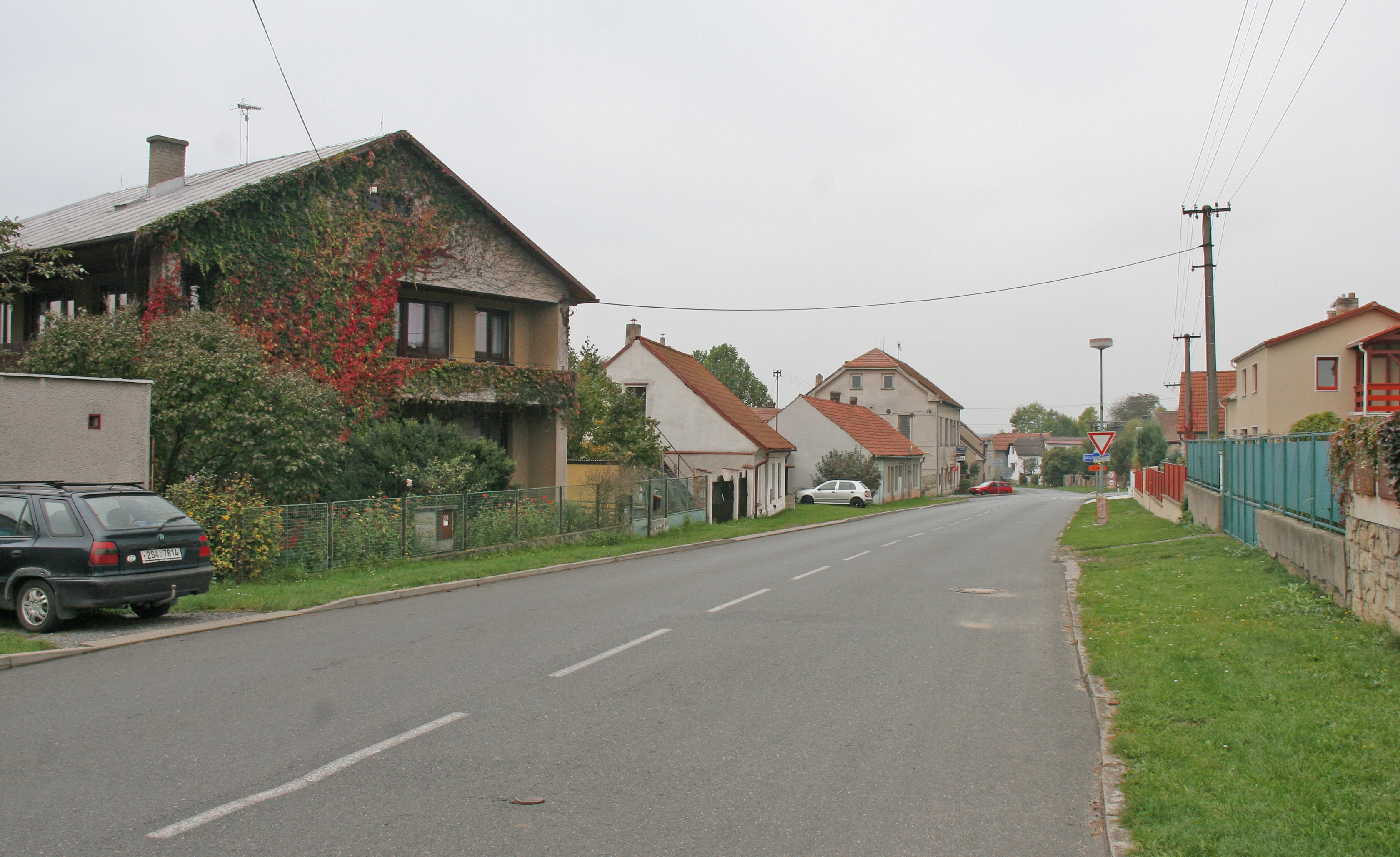 Krakovany čp. 228